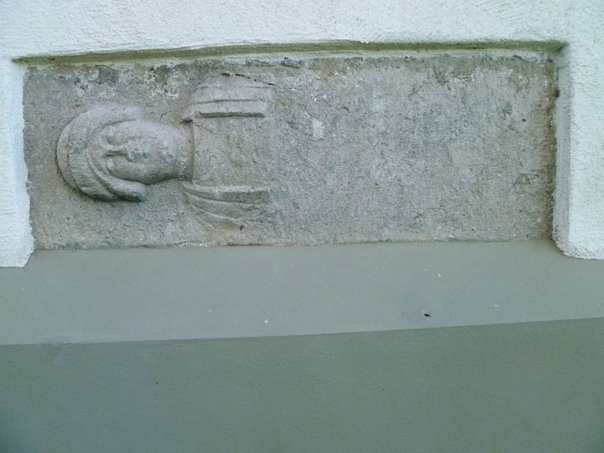 Kath. Filialkirche hl. Georg